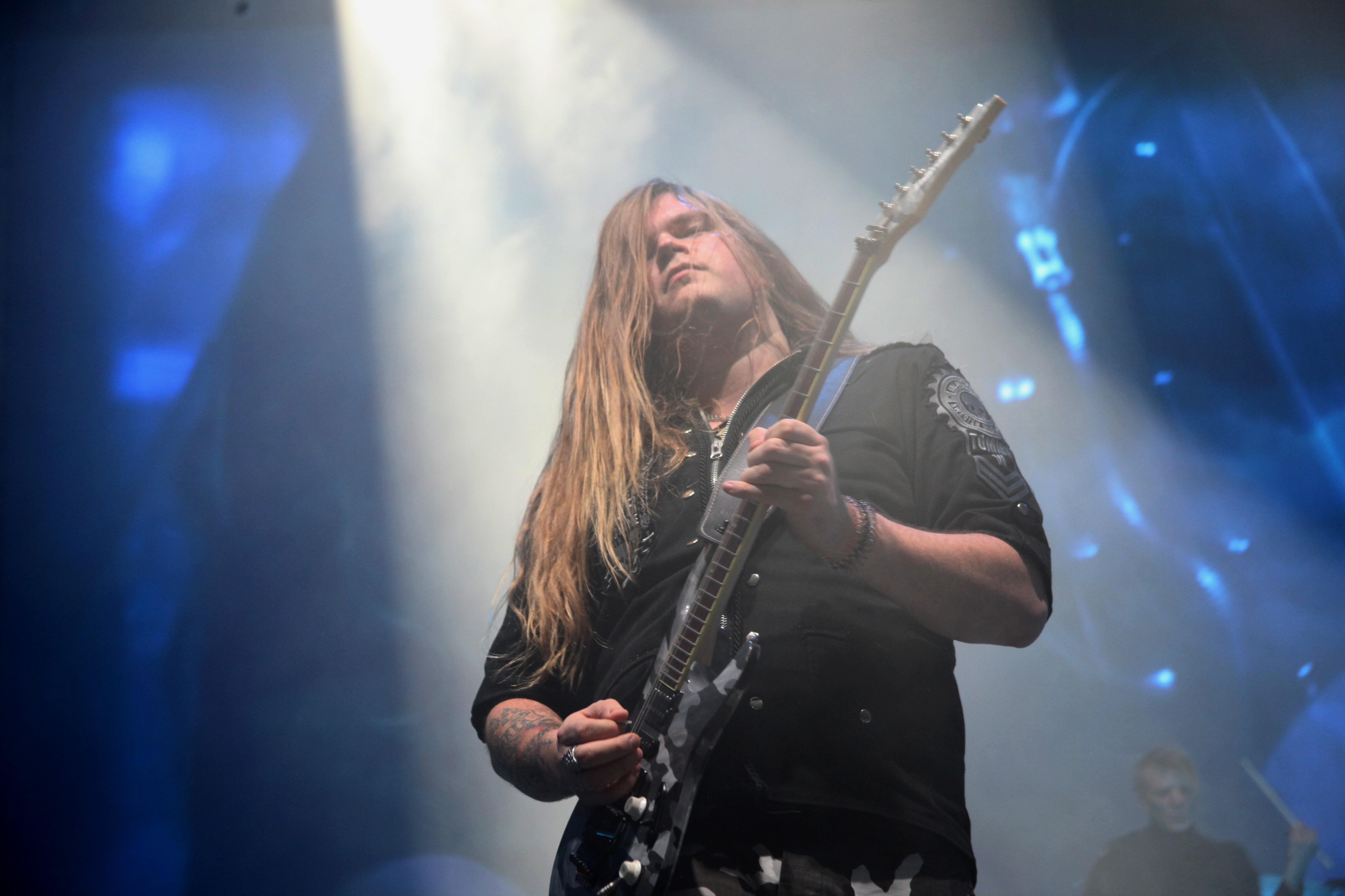 Sabaton auf der „The Great Tour“ in der Hanns-Martin-Schleyer-Halle